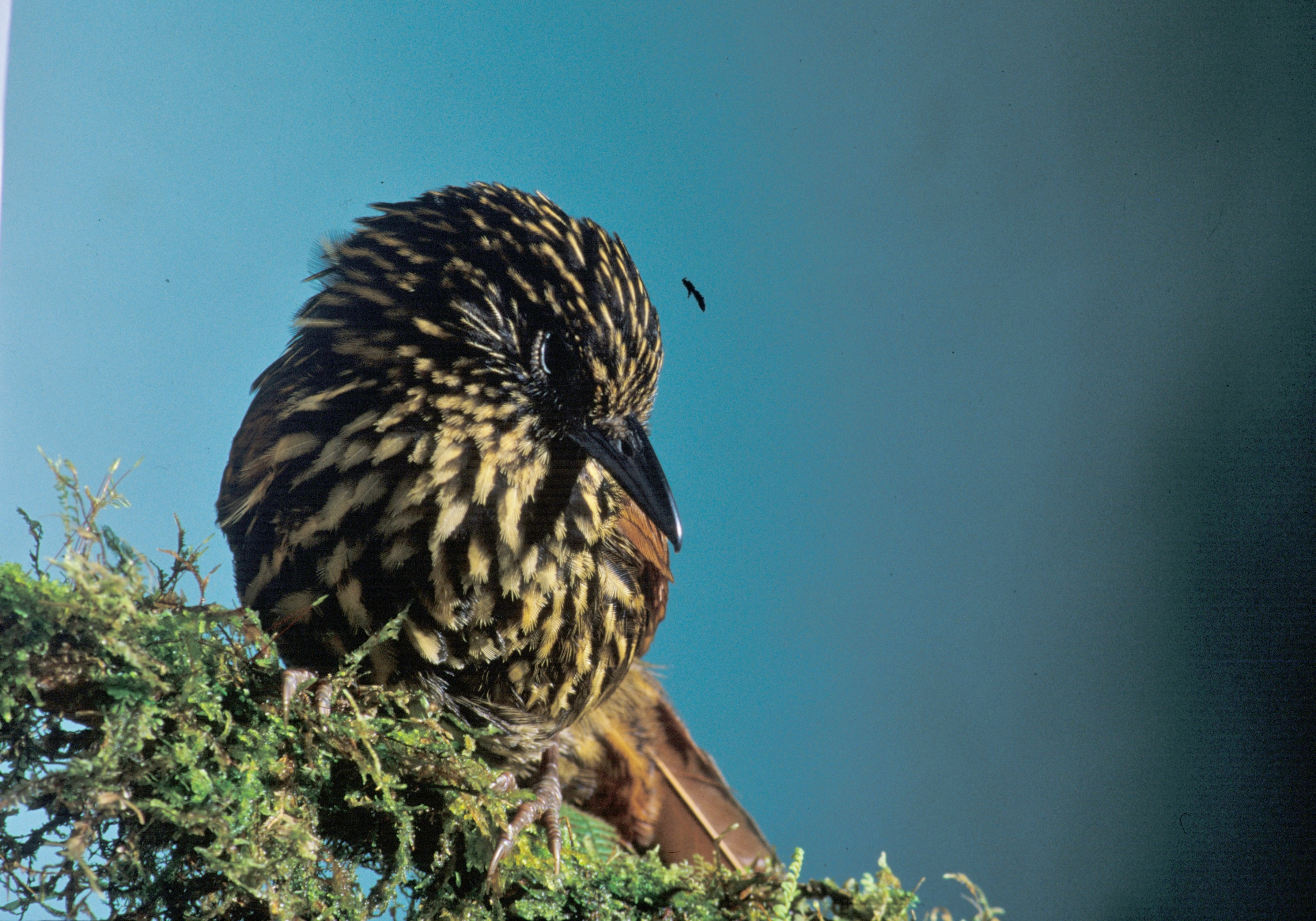 Flammulated Treehunter ('Thripadectes flammulatus) in Ecuador. Picture from the NBII Image Gallery.